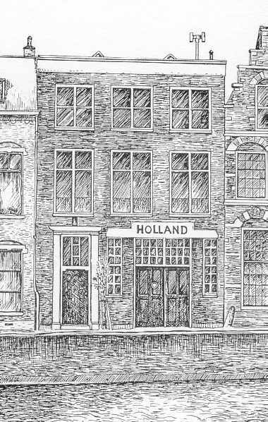 Magazijn en kantoor van Uitgeverij Holland aan het Spaarne in Haarlem. Aan de rechterkant bevindt zich het voormalig woonhuis en atelier van Kees Verwey.